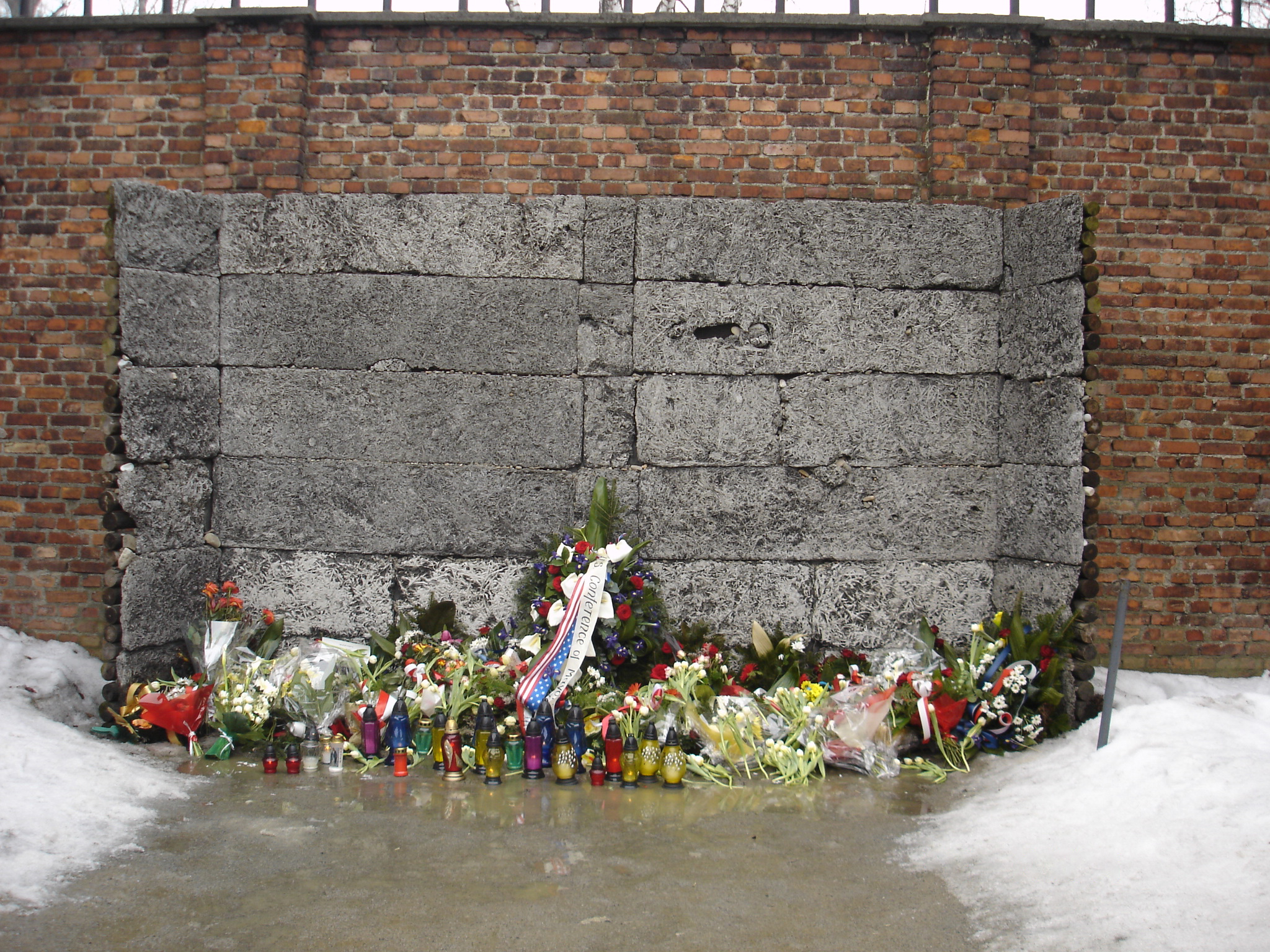 Ściana straceń w Obozie Koncentracyjnym Auschwitz 1/ Execution Wall in Auschwitz 1